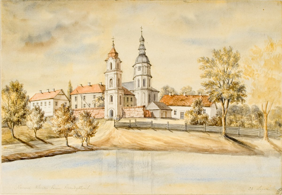 Беларуская (тарашкевіца): Нясьвіж (Niaśviž), вуліца Бэнэдыктынская (vulica Benedyktynskaja). Касьцёл Сьвятой Яўхіміі і кляштар бэнэдыктынак